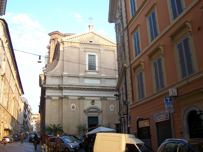 Roma - Chiesa di S. Andrea delle Fratte